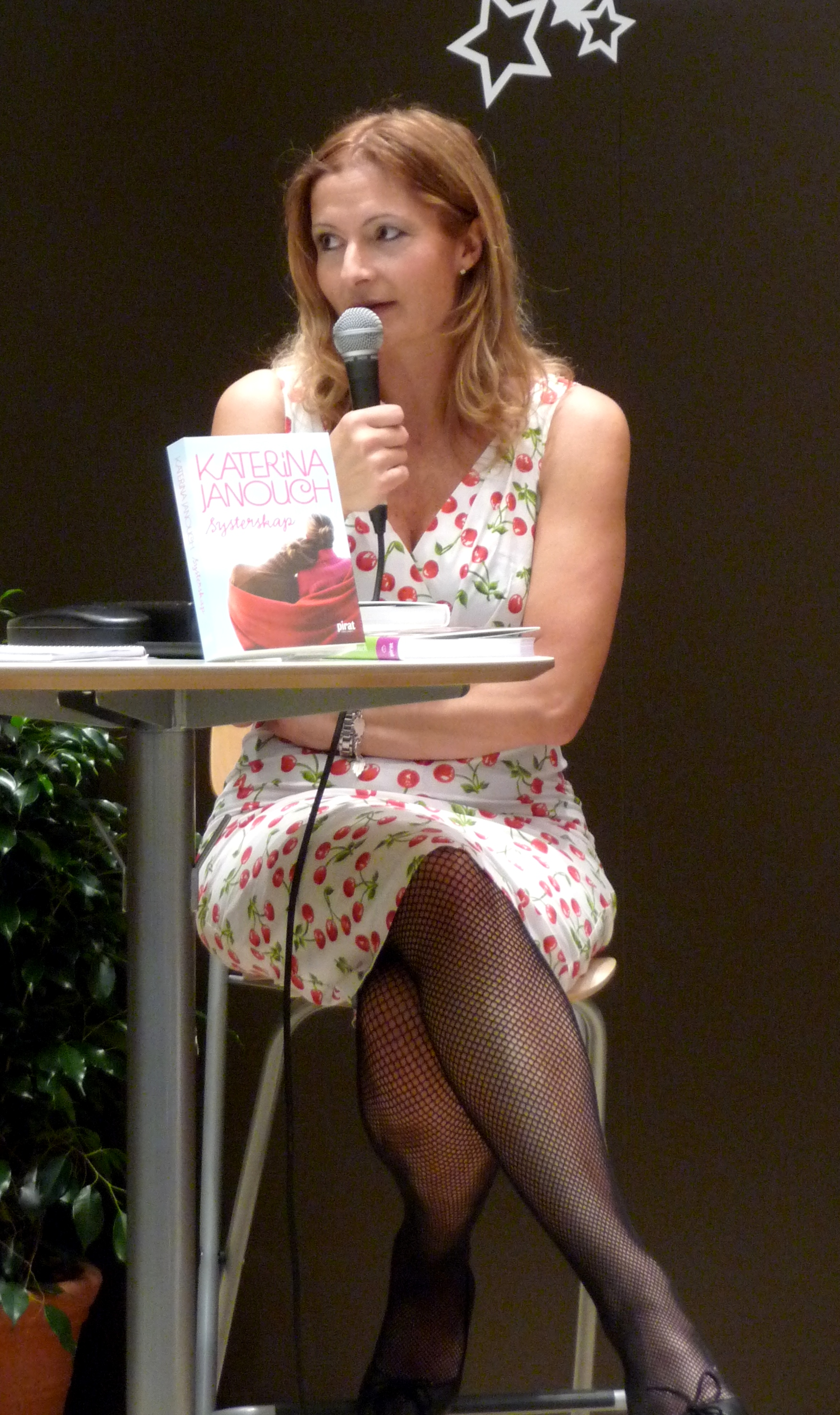 Katerina Janouch på bokmässan i Göteborg 2009.